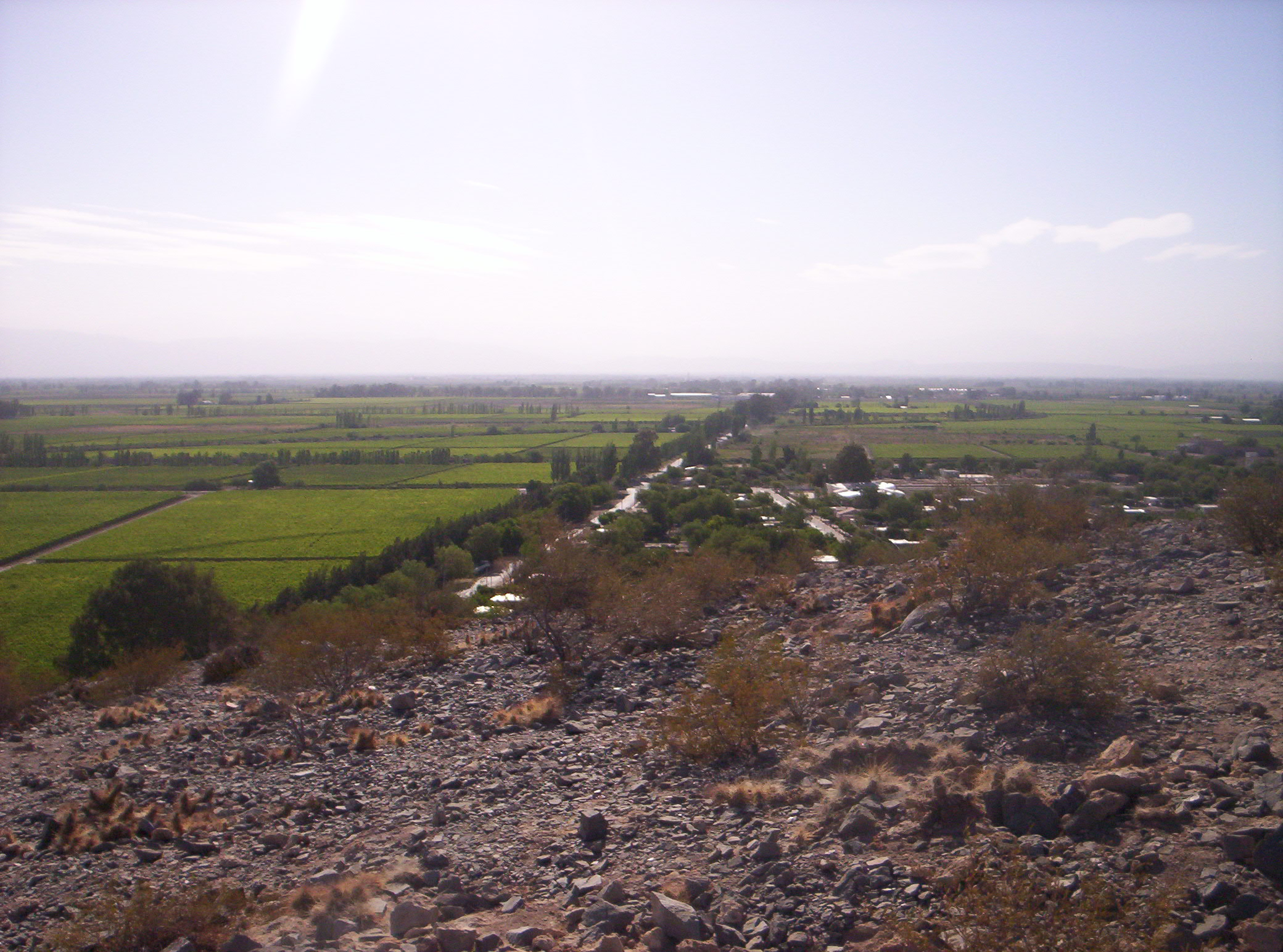 Vista de un paisaje cultivado en el Valle del Tulúm, desde la Sierra de Pie de Palo, en la localidad de Villa Dominguito en el departamento San Martín, provincia de San Juan, Argentina